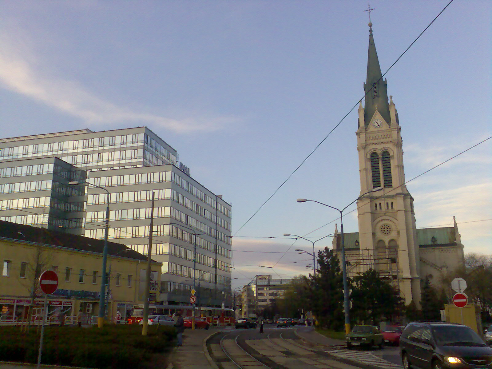 A Szűz Mária Mennybemenetele templom (jobbra).